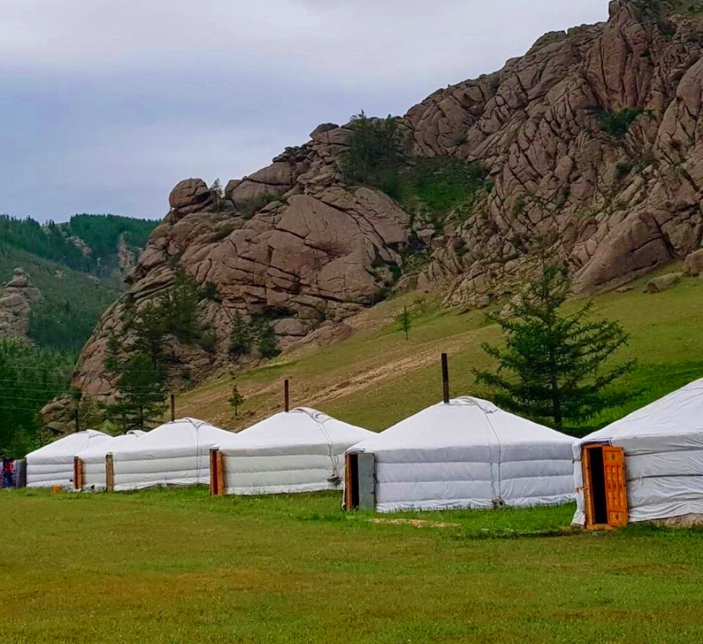 Yurts in the tourist camp. Mongolia